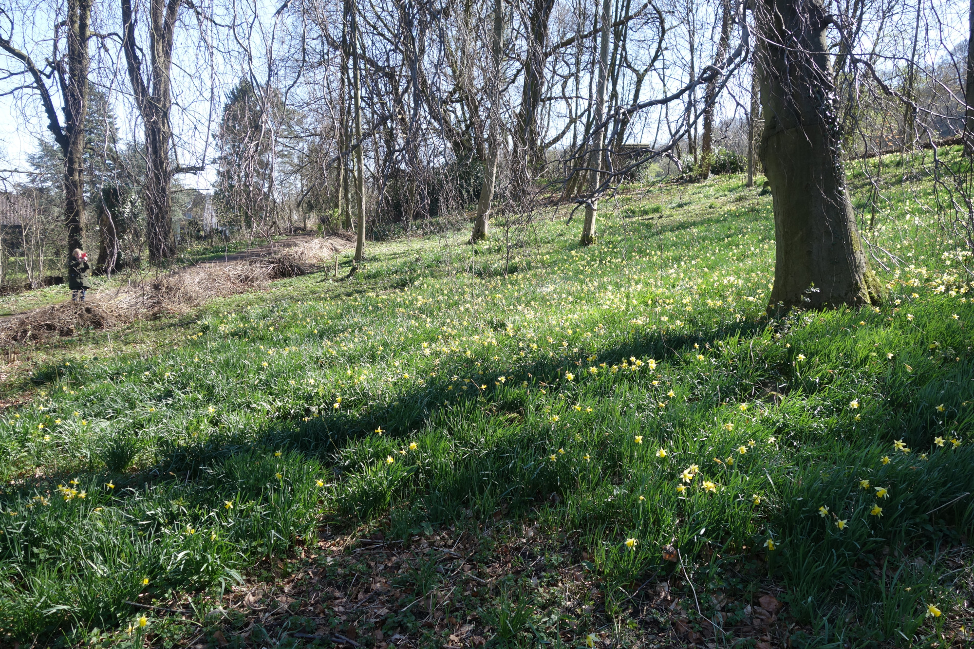 Müschpark - Wilde Narzissen im März 2020